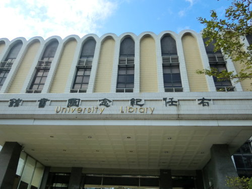 中文（台灣）: 明新科技大學右任紀念圖書館，為紀念于右任而命名。